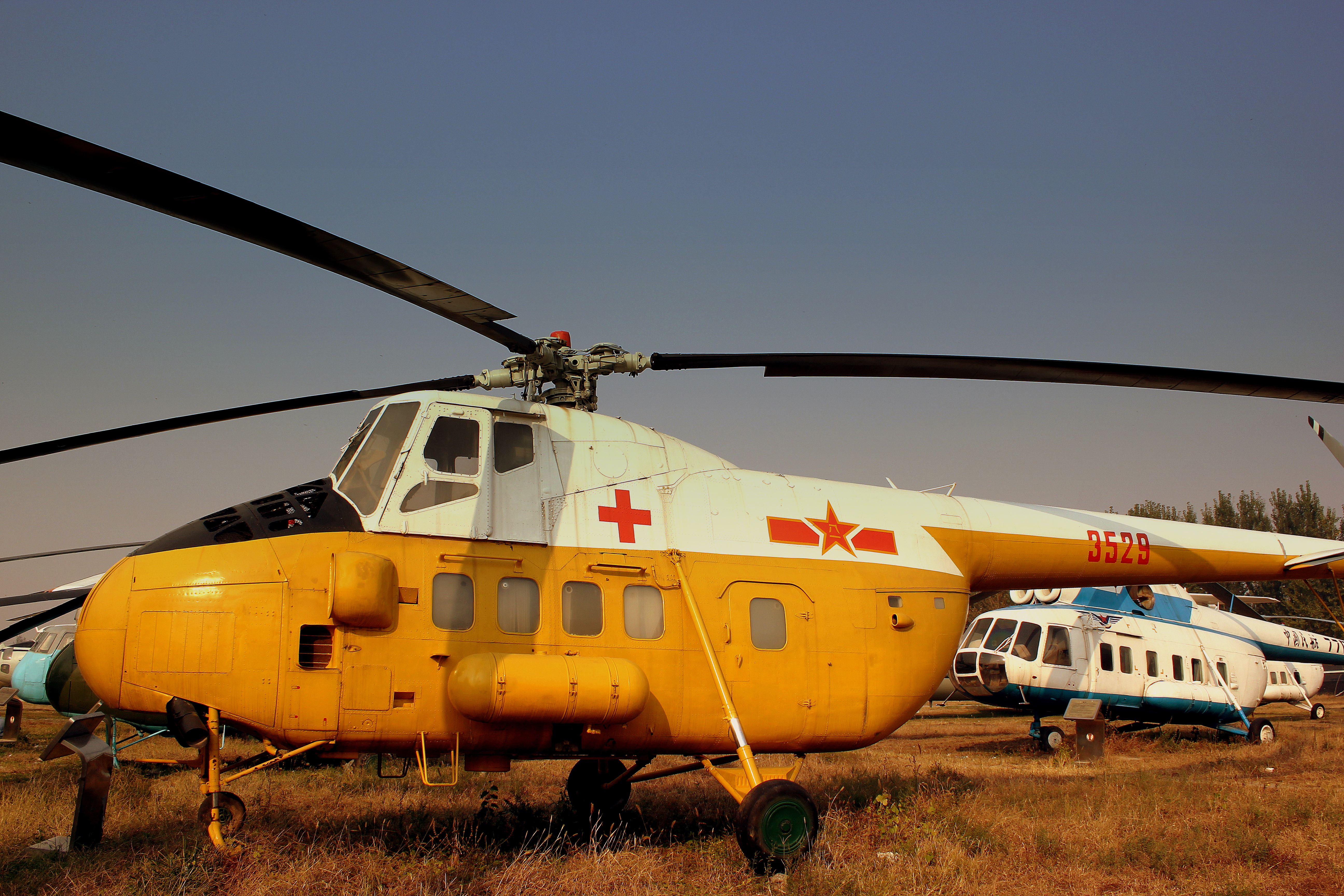 DATANSHAN CHINA AVIATION MUSEUM BEIJING OCT 2012